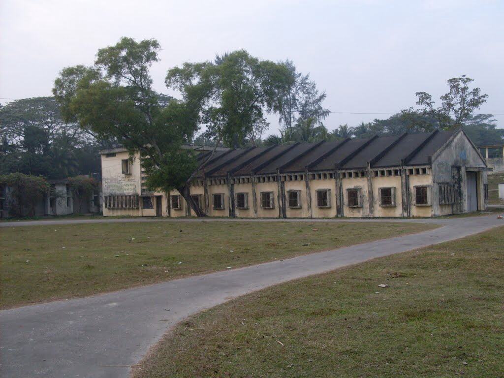 এটা ফিস হেচারির সম্মুখ ভাগের ছবি